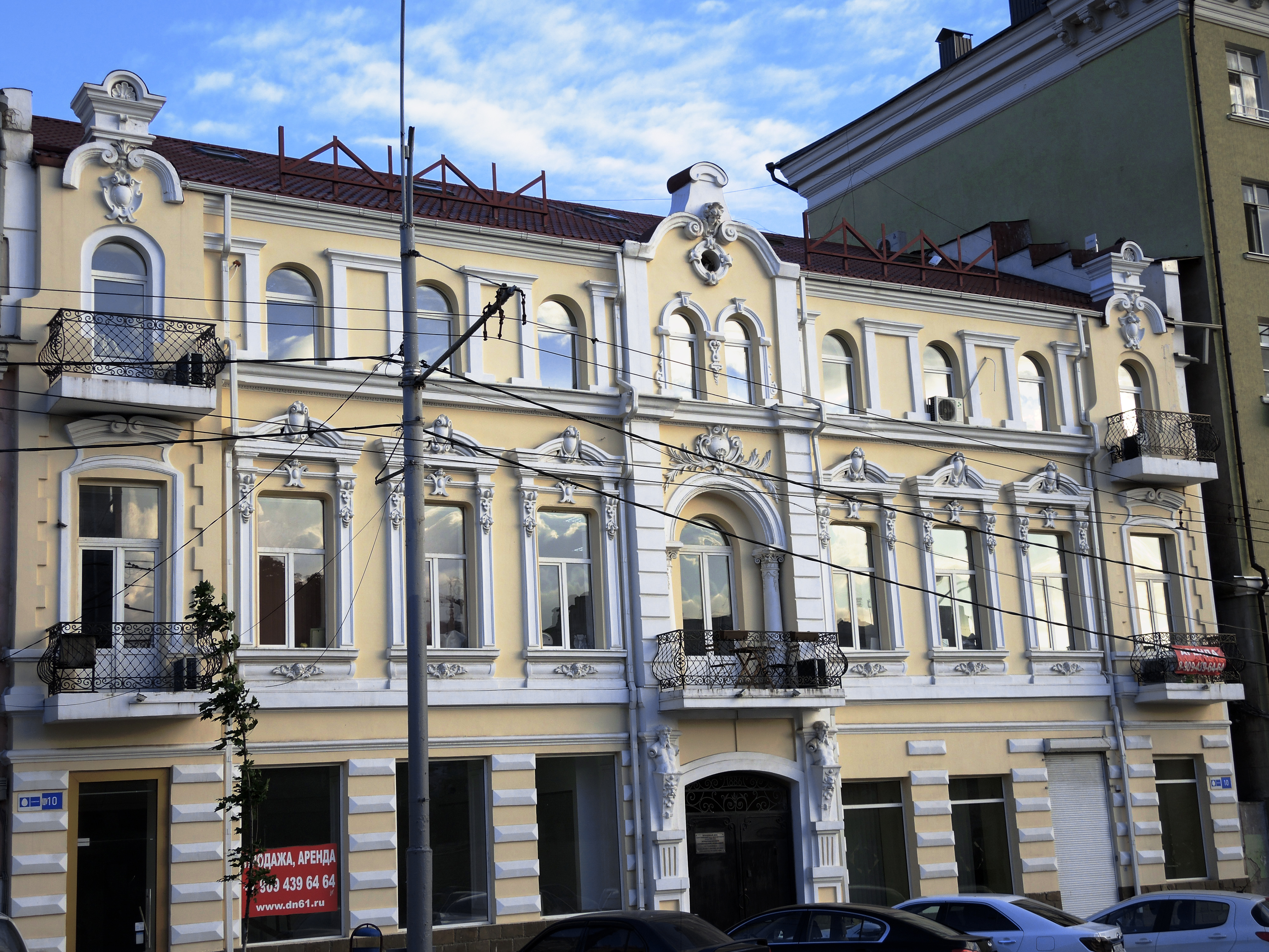 Доходный дом А.З. Аргутинского-Долгорукова: улица Большая Садовая, 10, литер А, Ростов-на-Дону, Ростовская область